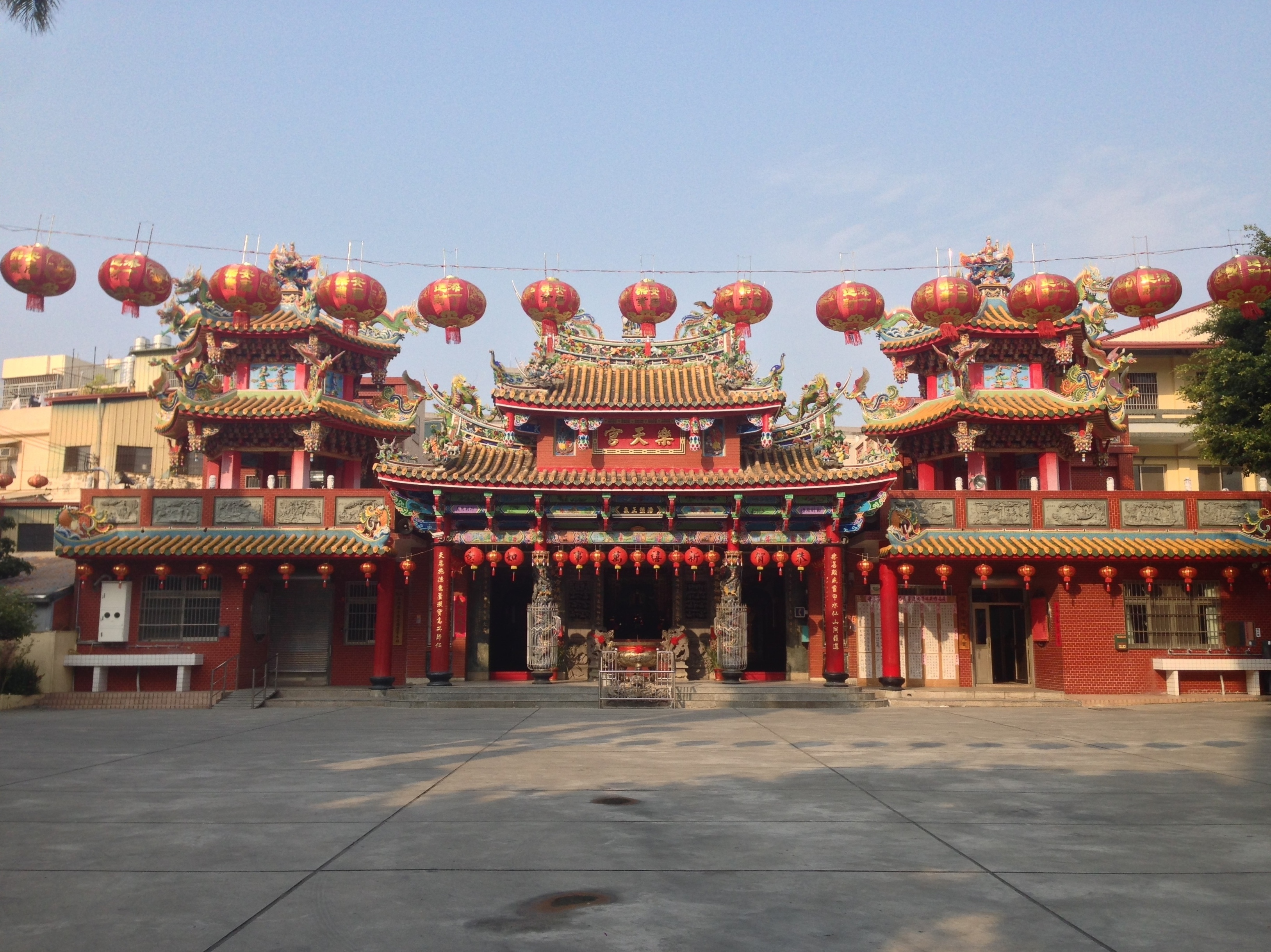 豐原樂天宮